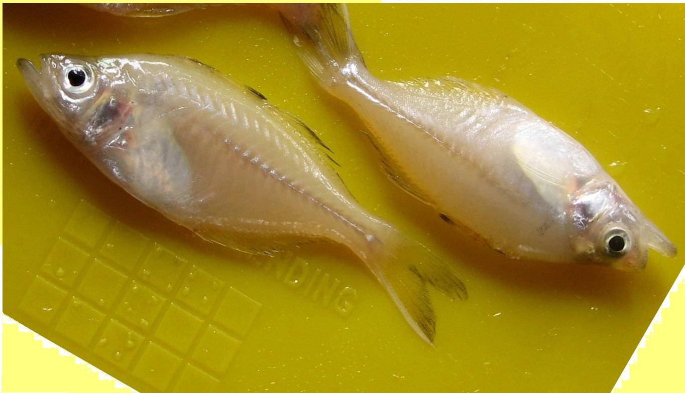 অসমীয়া: চন্দা মাছ।